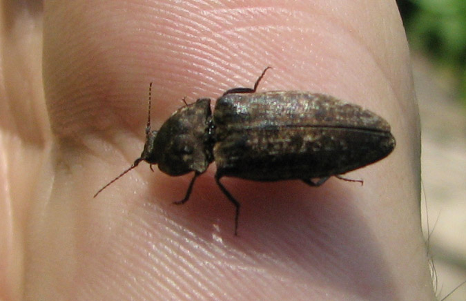 Adelocera murina